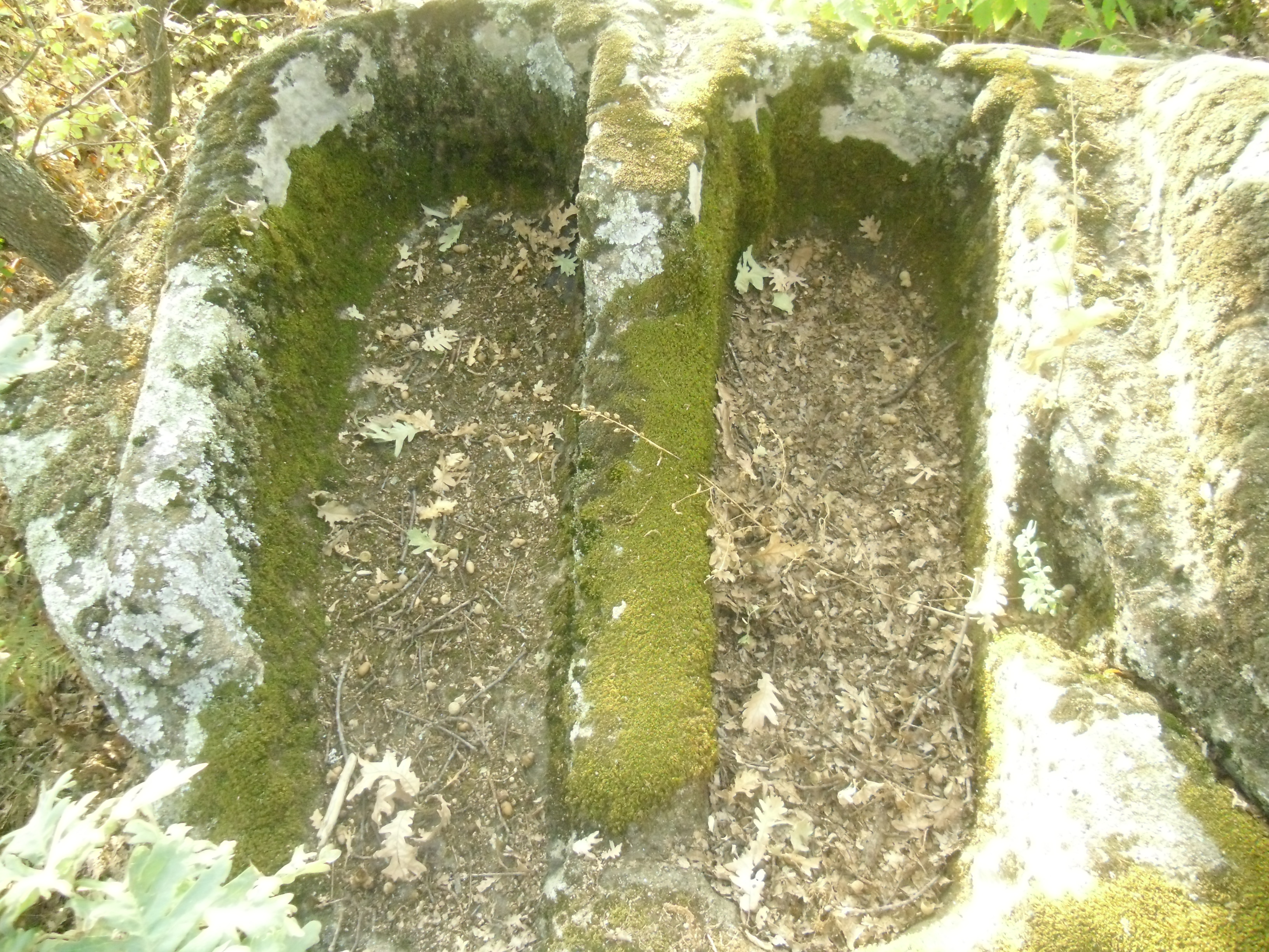 Una de las tumbas visibles en Barrado,esta se encuentra en el llamado Cerro de las Pilas.